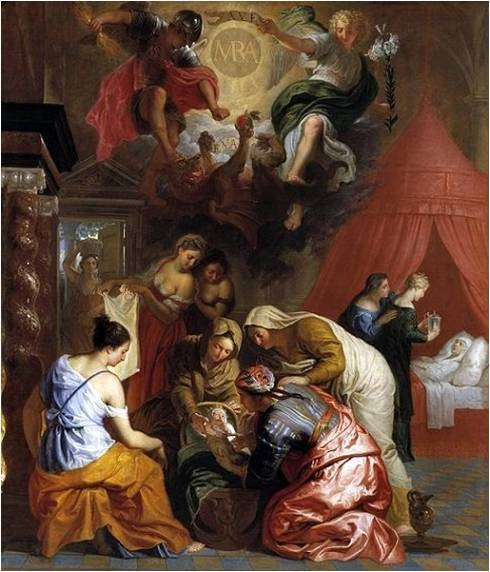 Llit